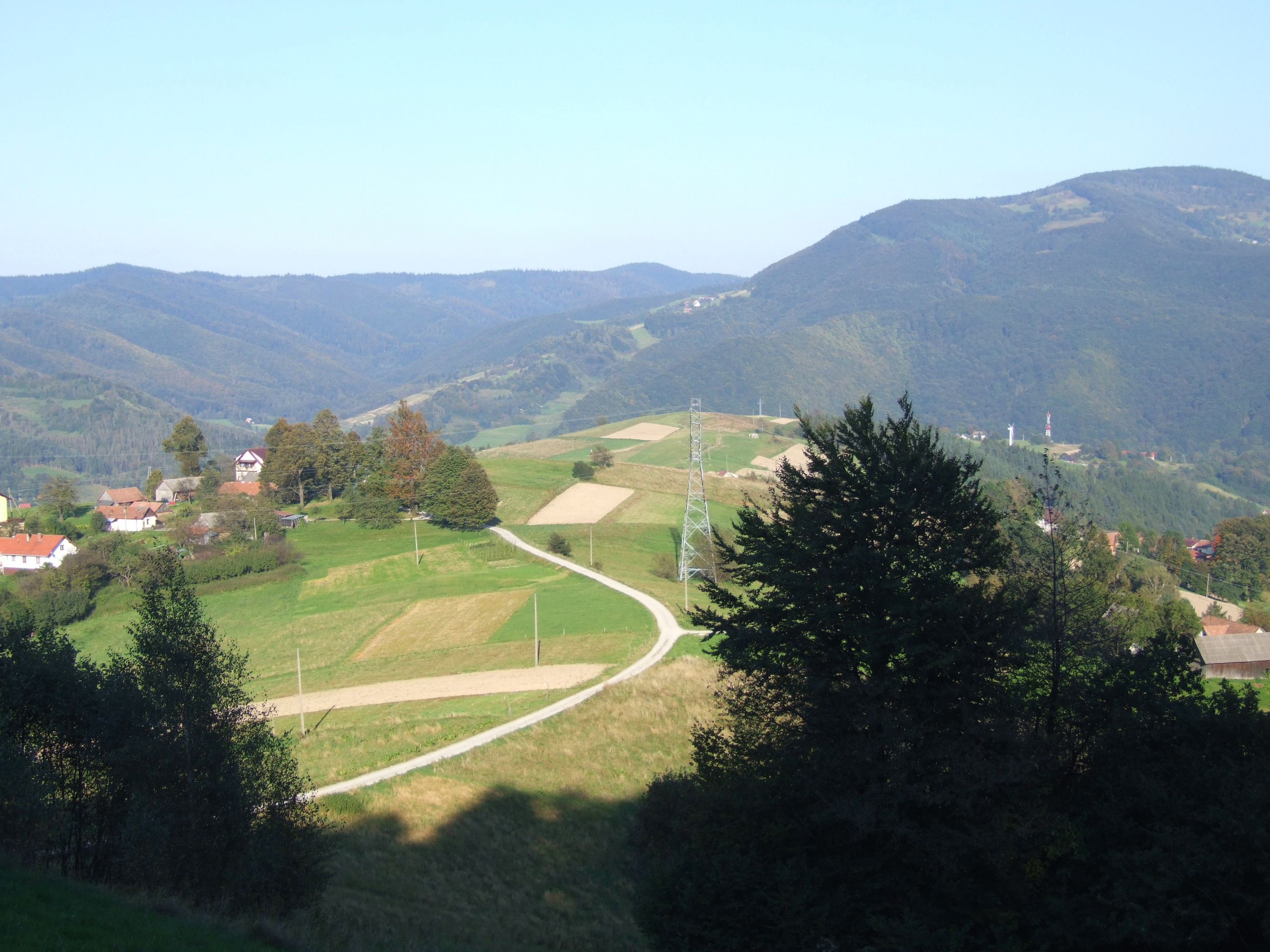 Grzbiet Połomia, dolina Popradu i Makowica